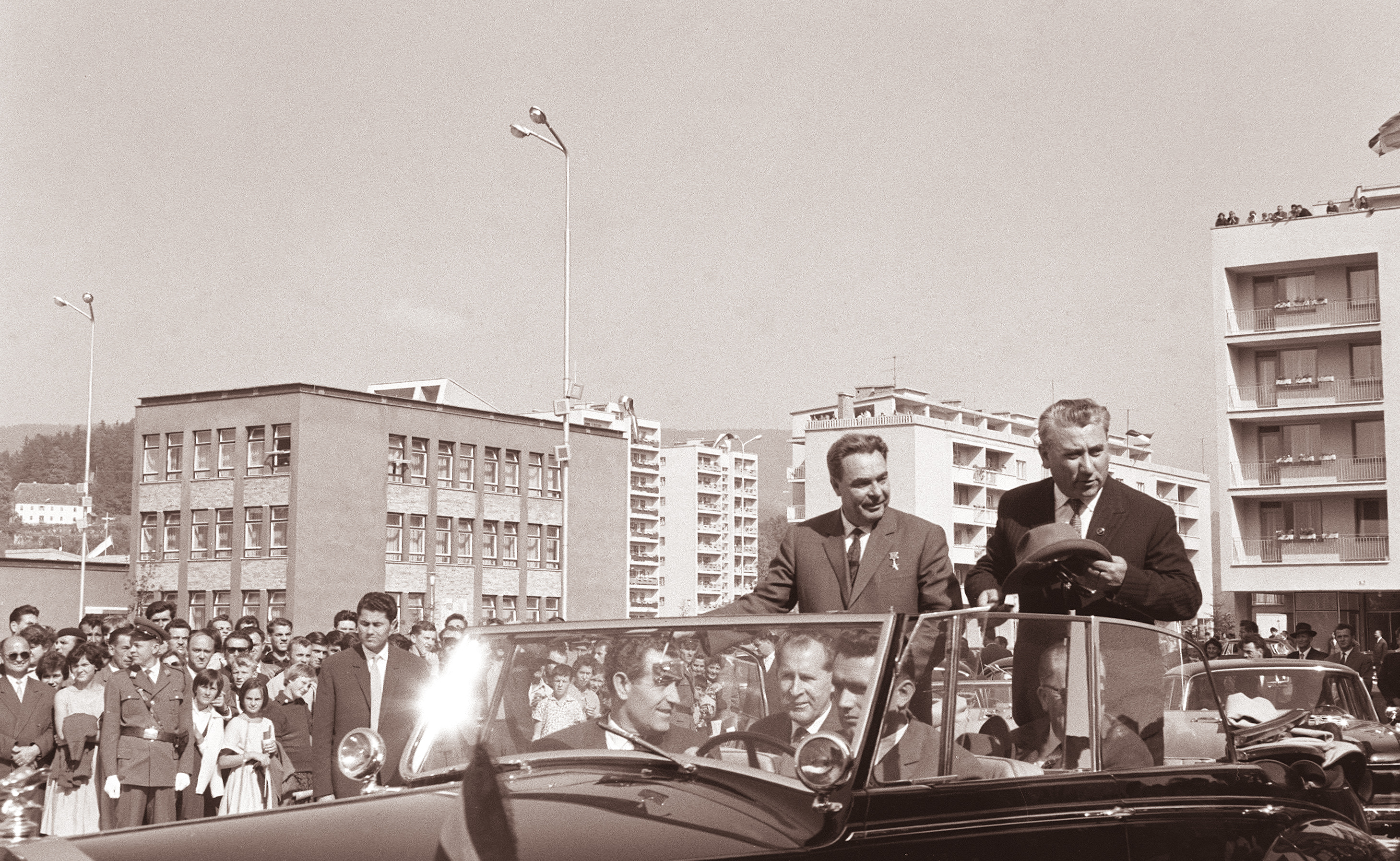 Predsednik Brežnjev v spremstvu Aleksandra Rankoviča in Miha Marinka odzdravlja zbranim Velenjčanom